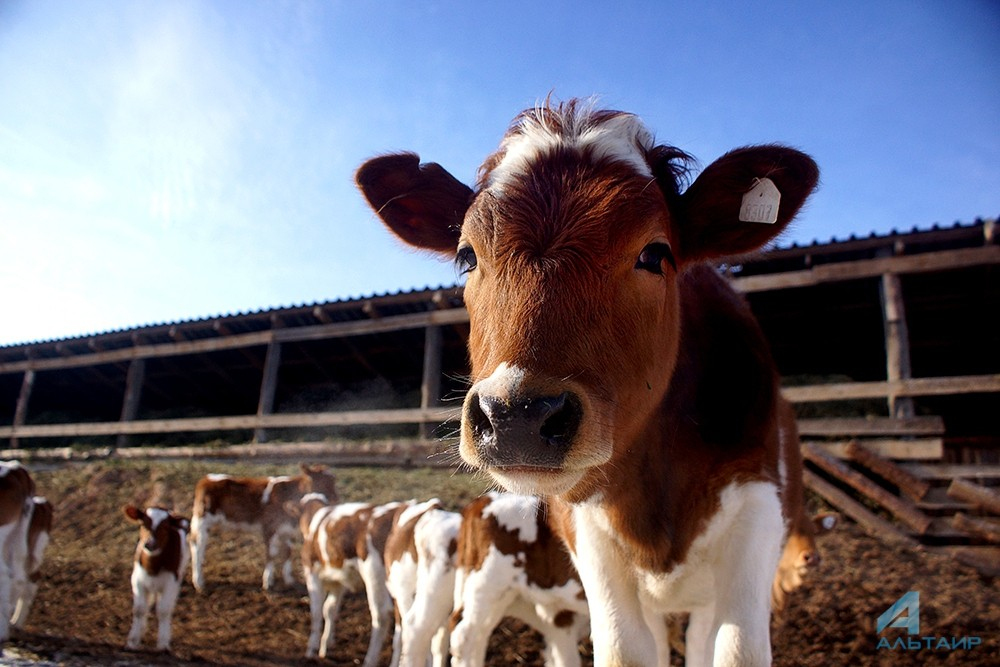 Телята